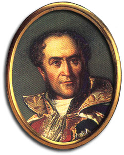 Guillaume Marie-Anne Brune, Napoleonic Marshal